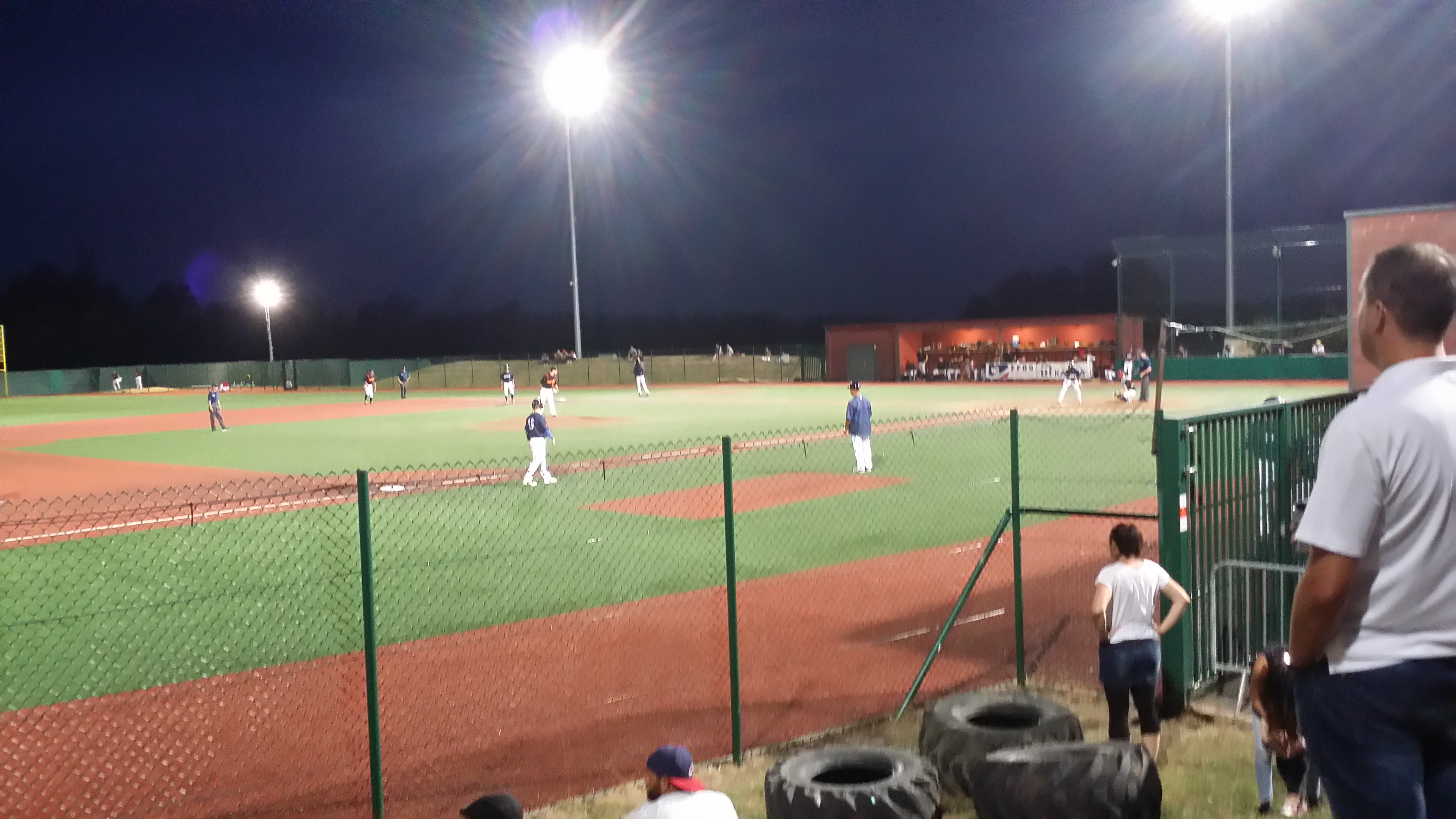 France International Baseball Tournament 2016 - France vs Allemagne, Victoire de l'Allemagne 10 à 8